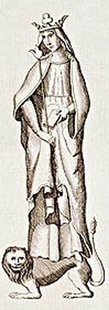 Matylda Flanderská